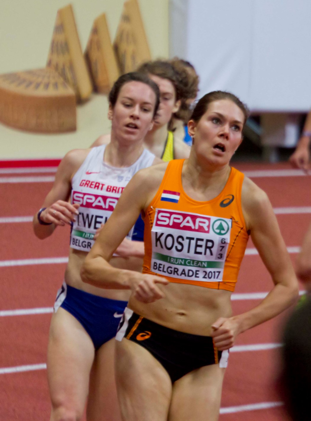 304 3000m koster